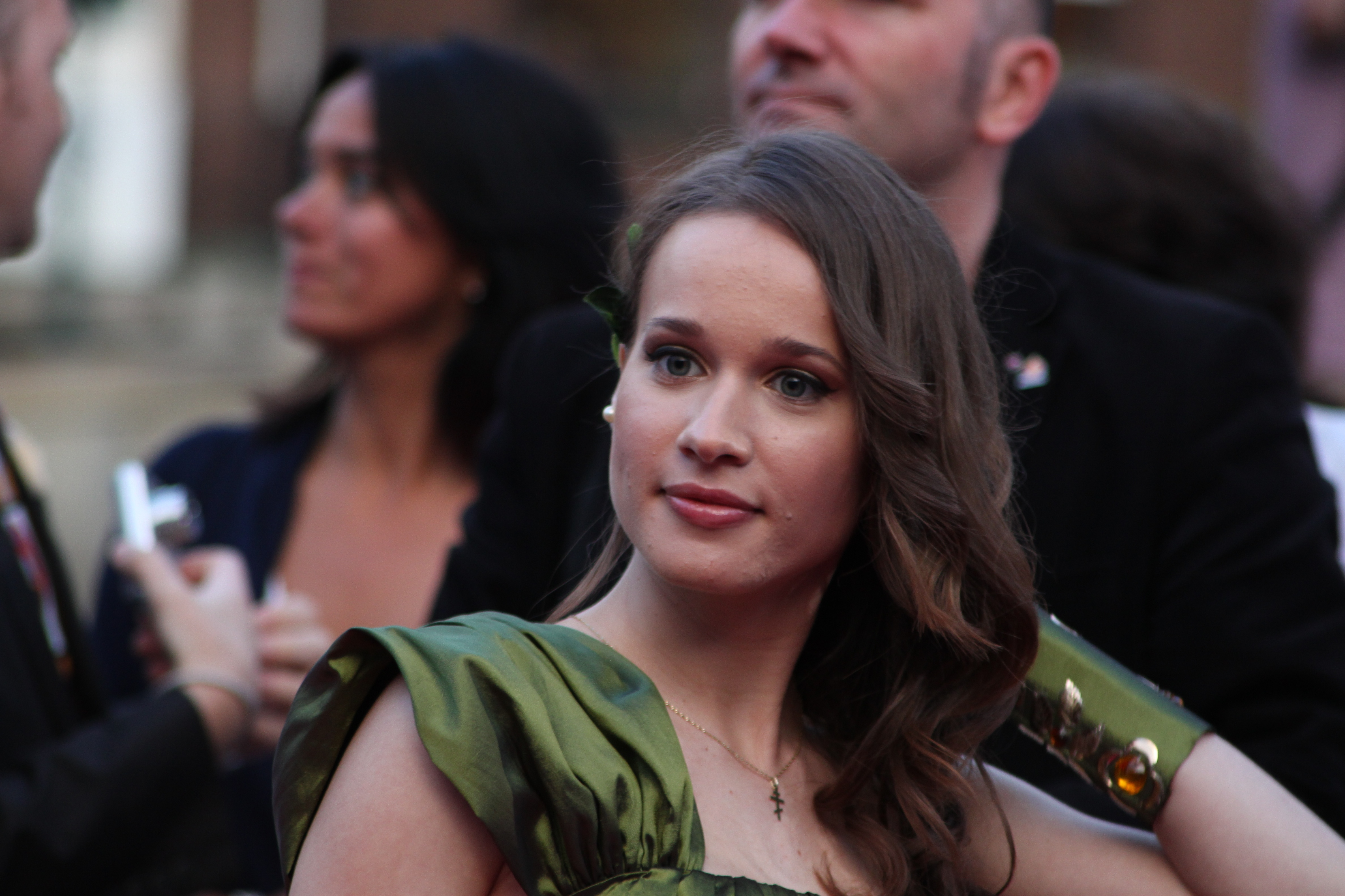 Foto: Vincent Hasselgård, Aktiv I Oslo.no